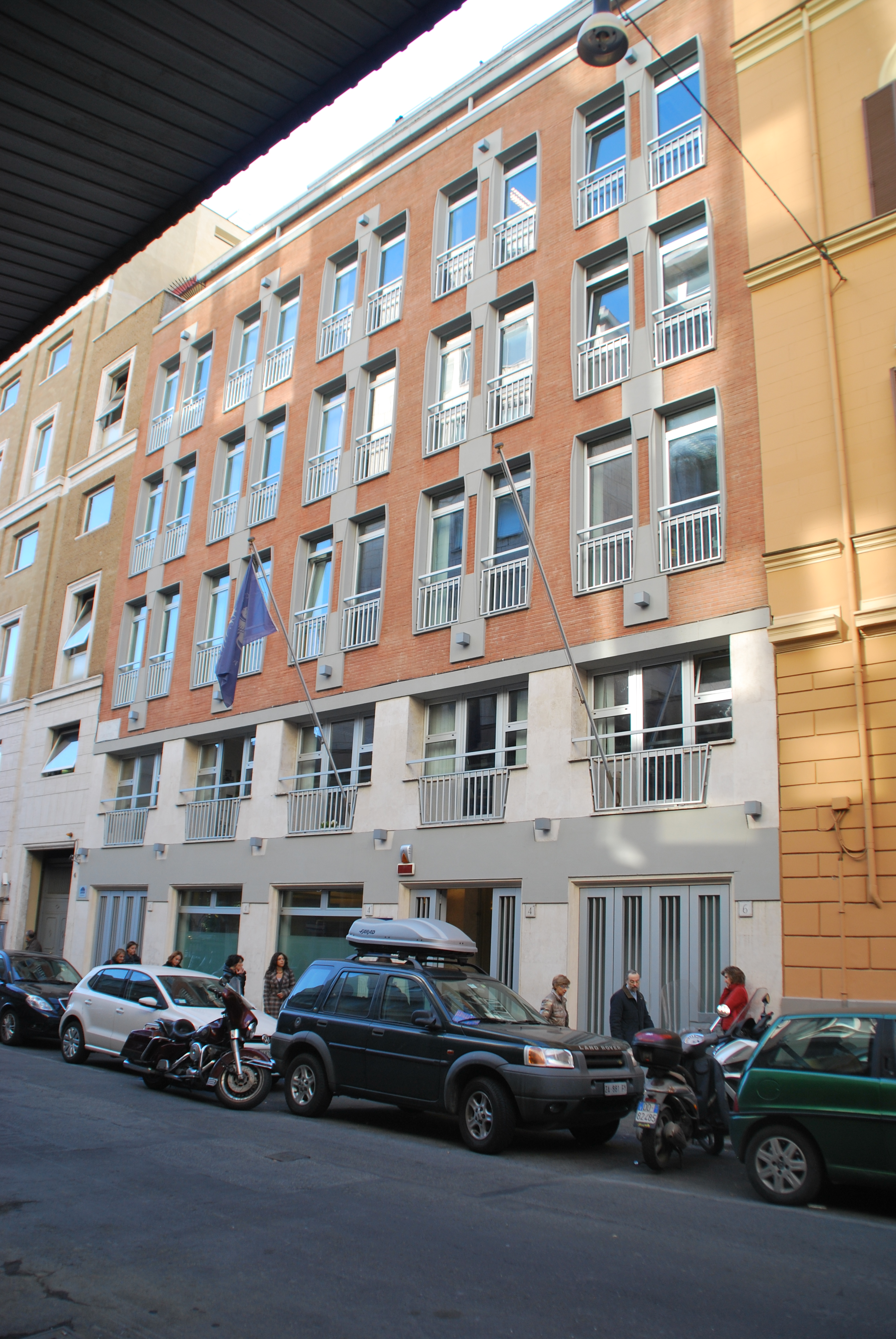 Sitz des Deutschen Archäologischen Instituts in Rom, Via Curtatone, 4 d, November 2012